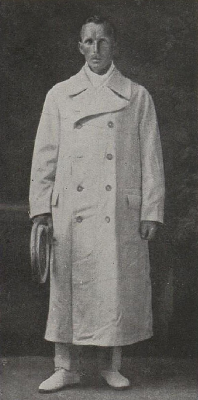 František Koželuh (1887-1969), český fotbalový záložník a všestranný sportovec